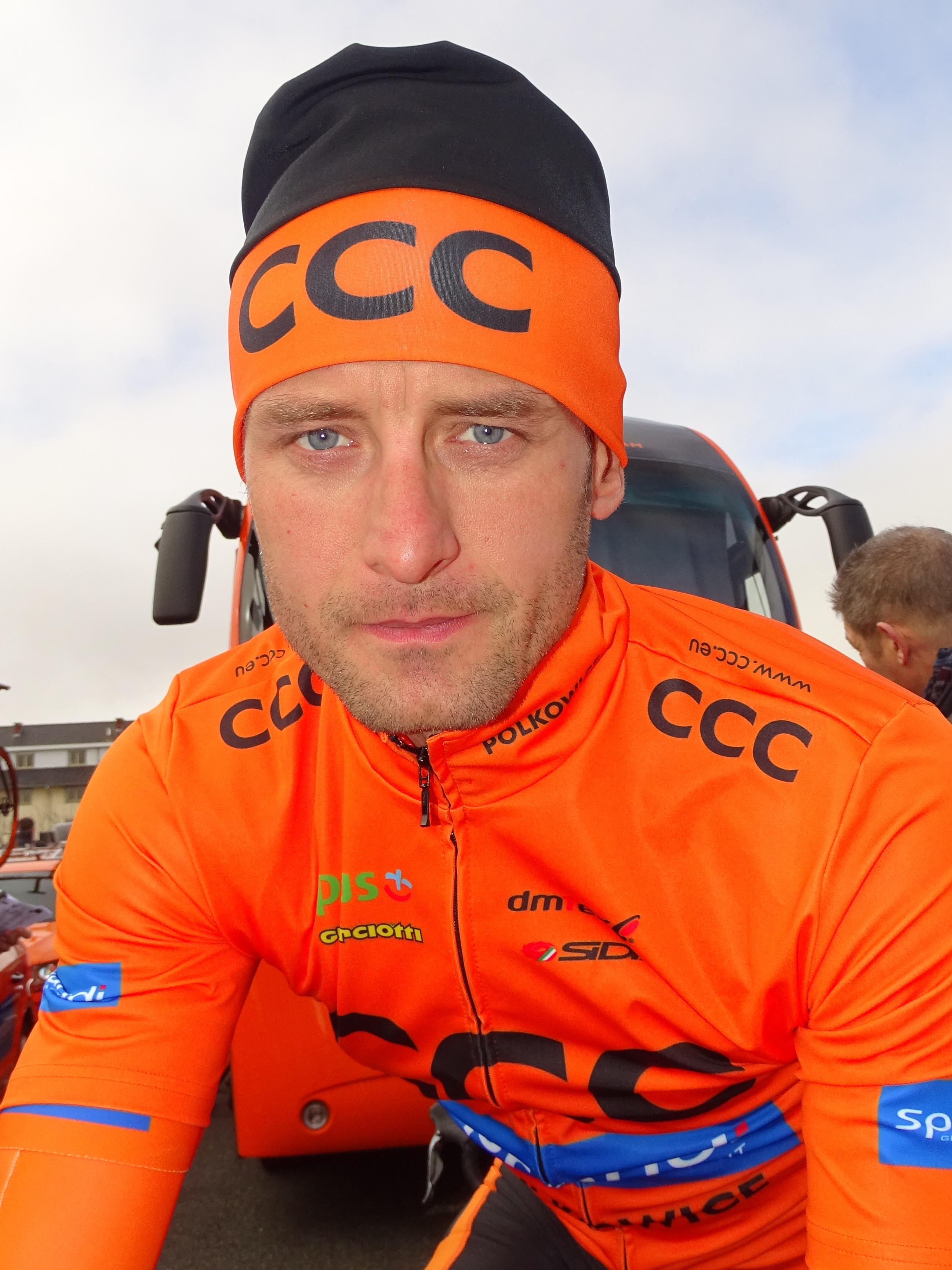 Reportage réalisé le vendredi 18 mars à l'occasion du départ de la Handzame Classic 2016 à Bredene, Belgique.